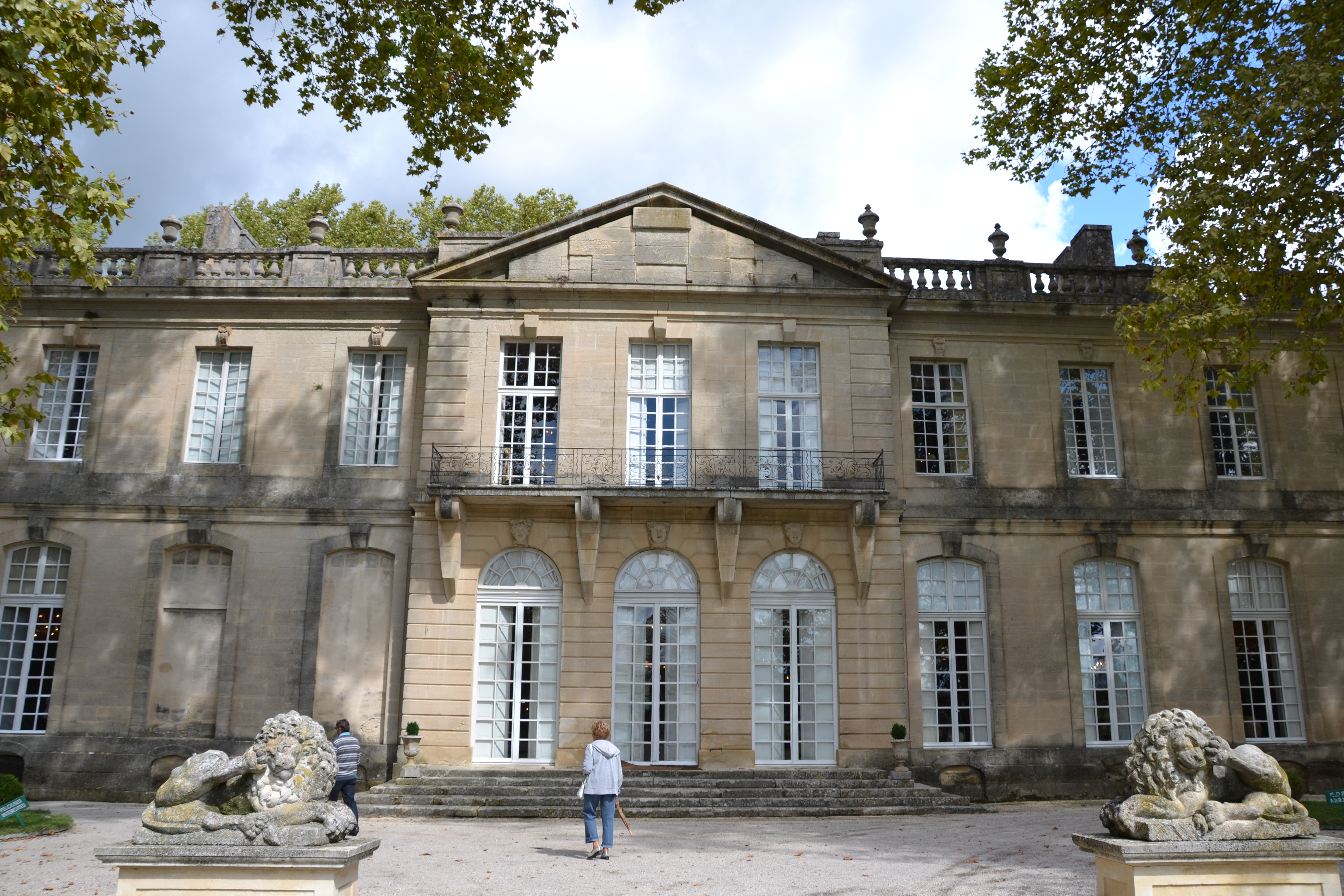 Château de Sauvan (ClasséInscrit) .